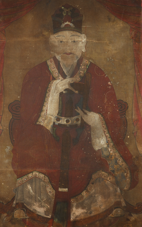 사도세자(조선 장조) 영정 (서울 은평구 구파발 사신당에 봉안된 사도세자 초상화)